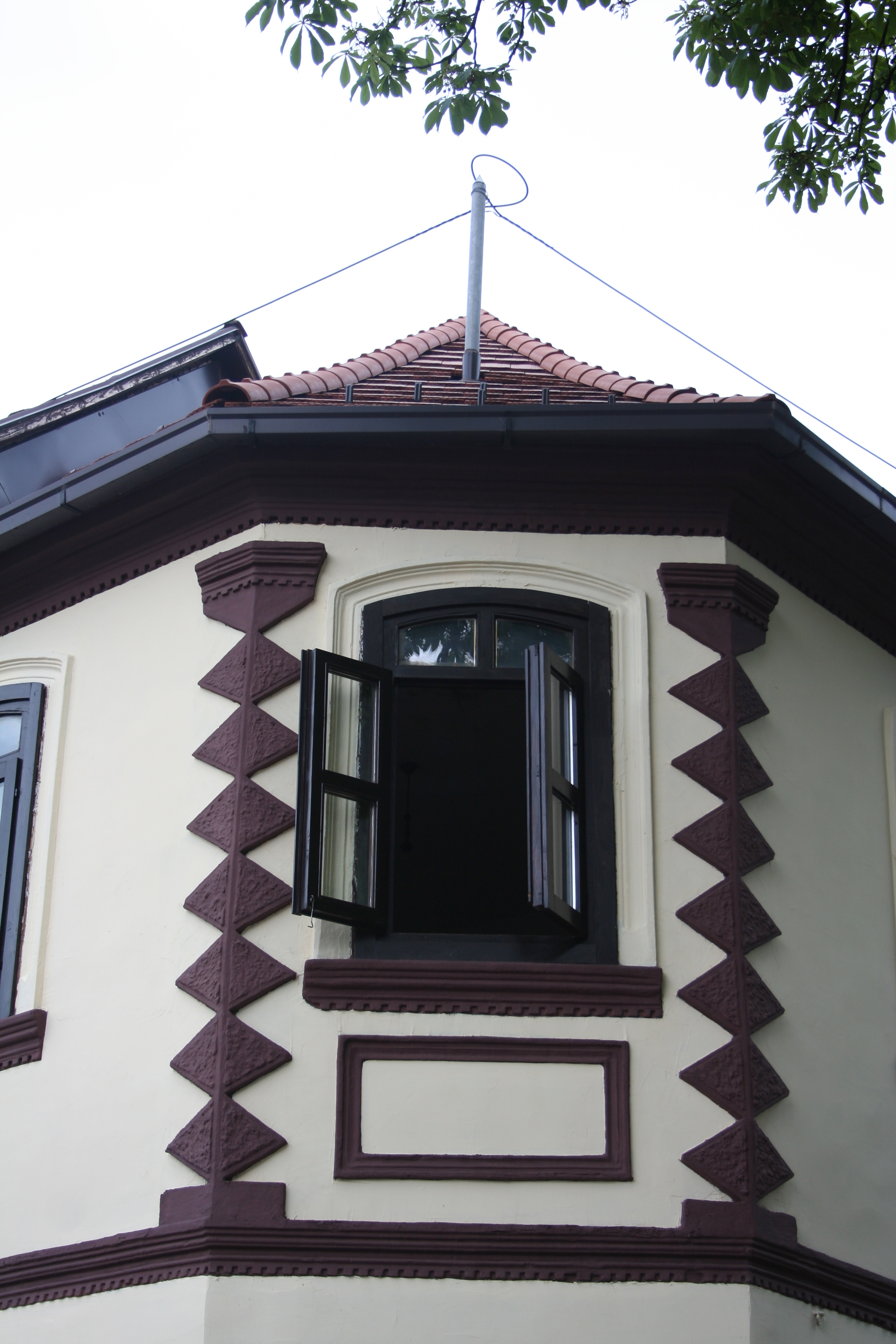 Stara čaršija u Bajinoj Bašti